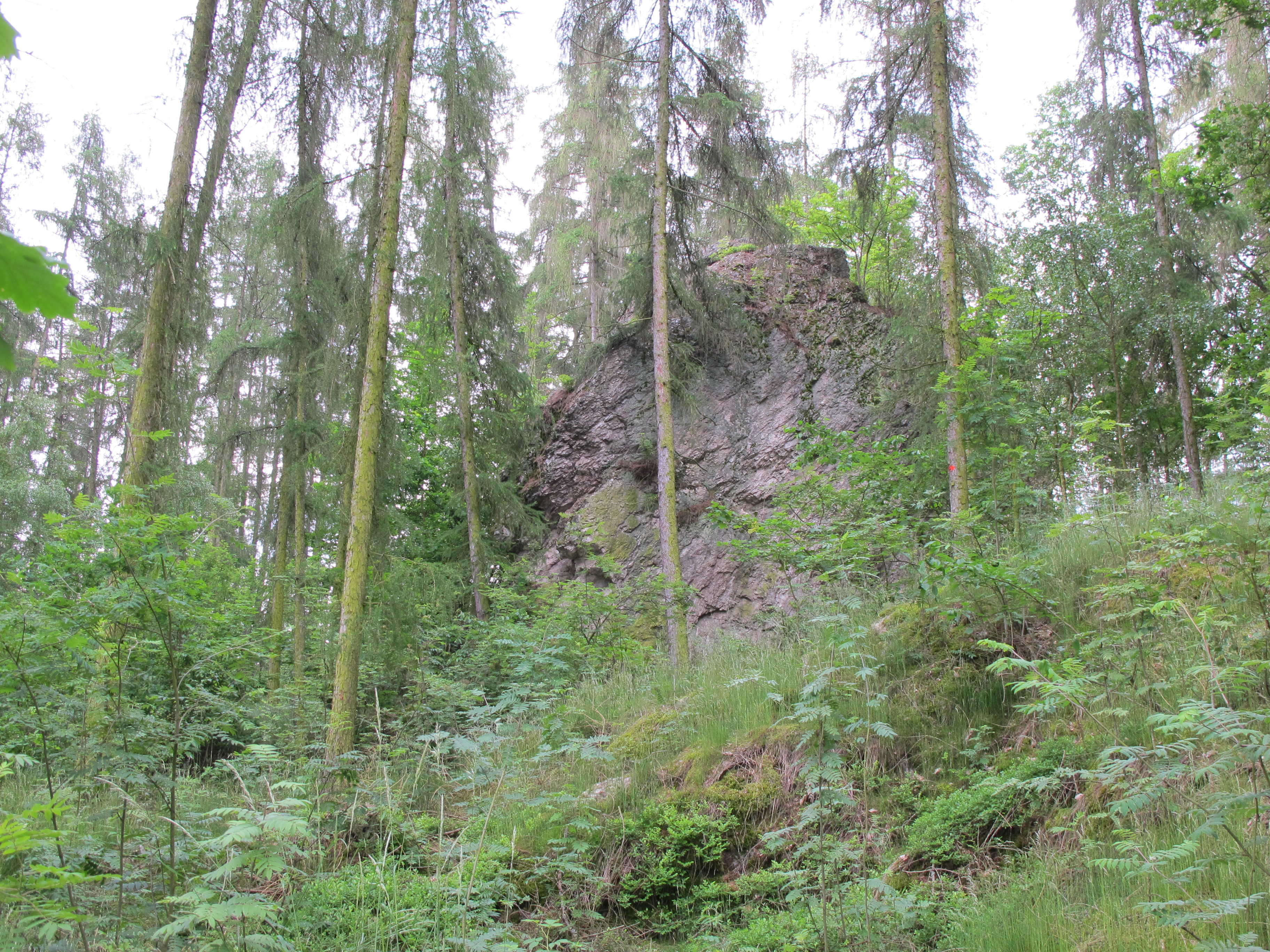 Křížový vrch u Dolního Žandova, okres Cheb. This image was acquired during the event Wikiměsto Mariánské Lázně.